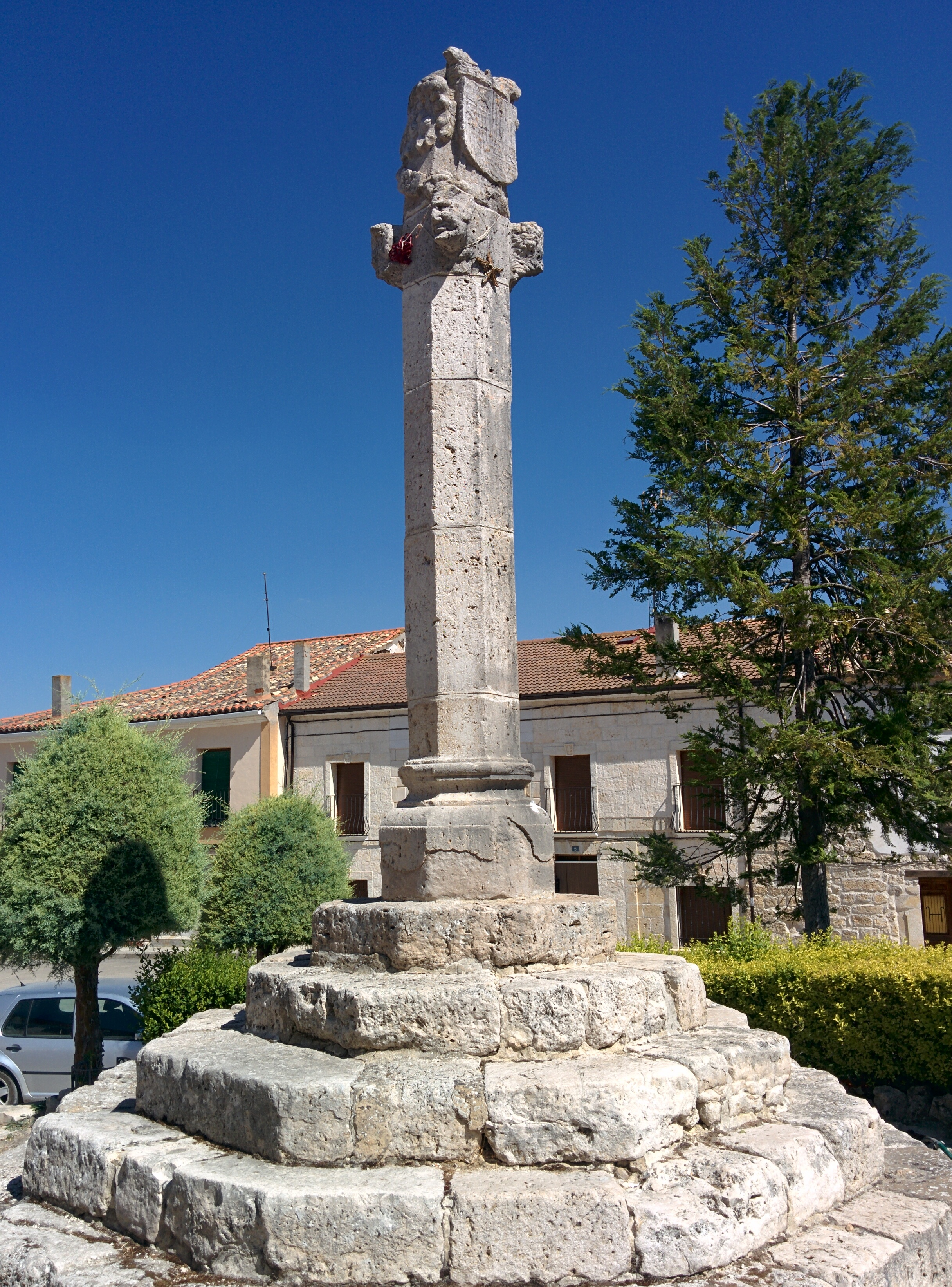 Rollo de Alba de Cerrato (Palencia, España).